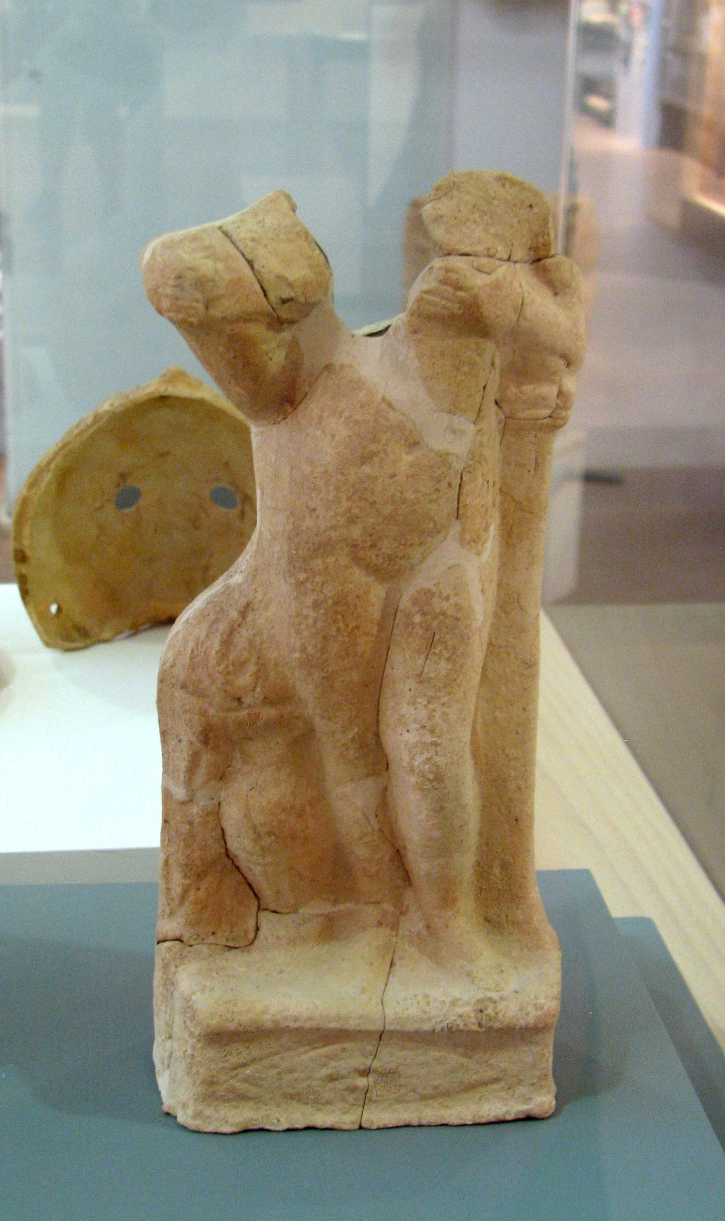 Findings from Hirbet Casra - In Castra Museum, Haifa Israel ממצאים צהאתר הארכאולוגי חירבת קסטרא, היום נמצאים במוזיאון קסטרא העתיקה הנמצא בקניון קסטרא בחיפה Fhgurin- Aphrodite of Cnidos צלמית אפרודיטה מקנידוס, נשעהת על עמוד, לרגליה אמפורה, מחרסף התקופה הרומית, מאה שניה-שלישית לספירה